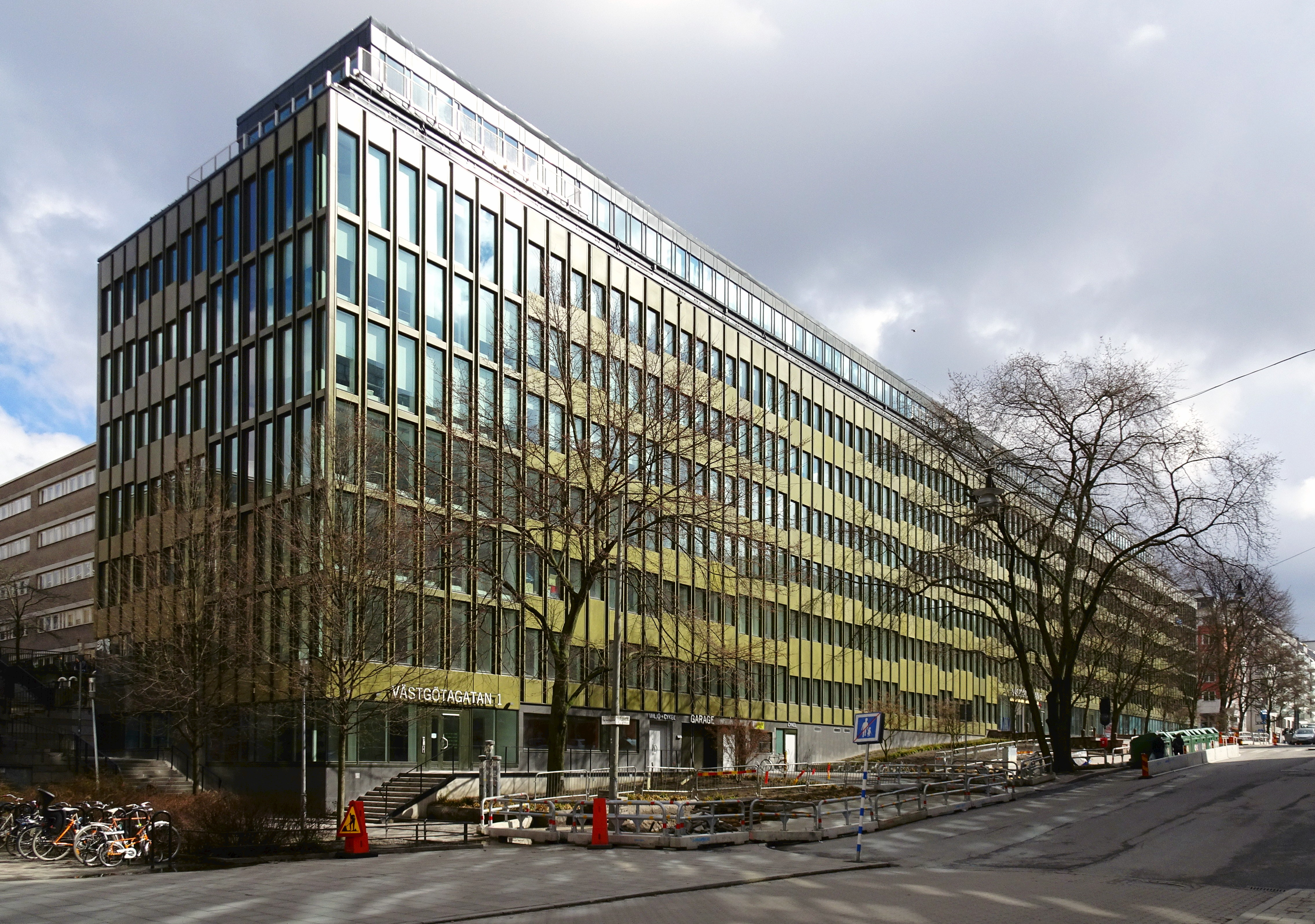 Kvarteret Nattugglan 14, Västgötagatan 1-7